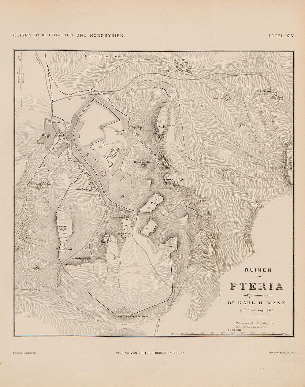 Plan der hethitischen Hauptstadt Hattusa, gezeichnet 1882 von Carl Humann